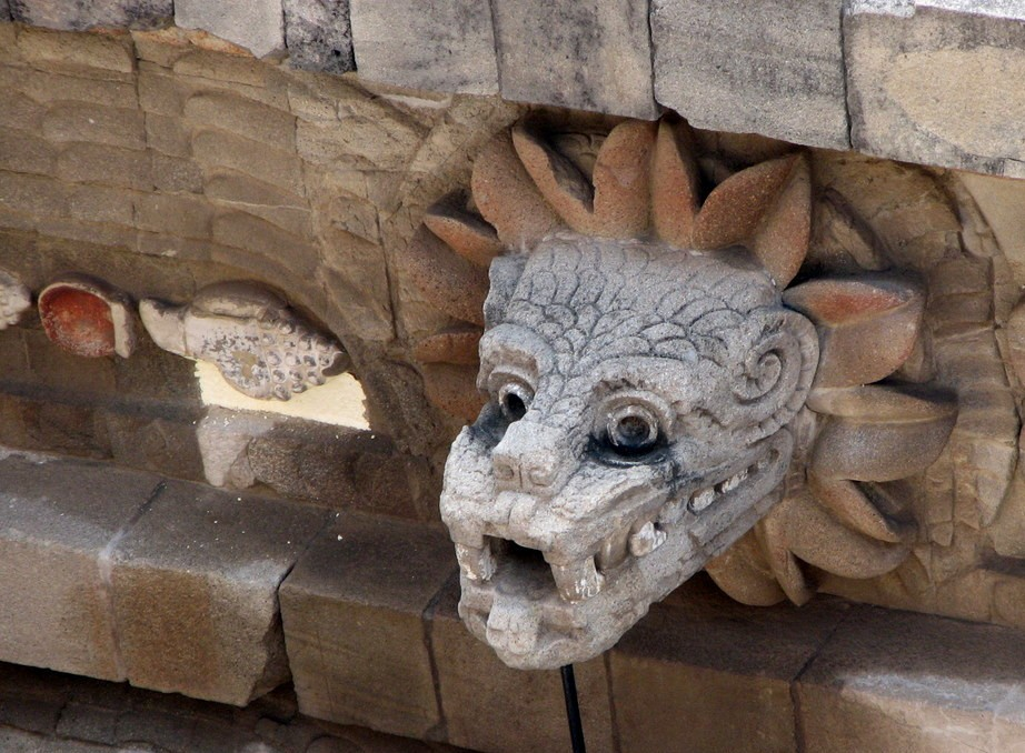 Busto de Quetzalcóatl en Teotihuacan.